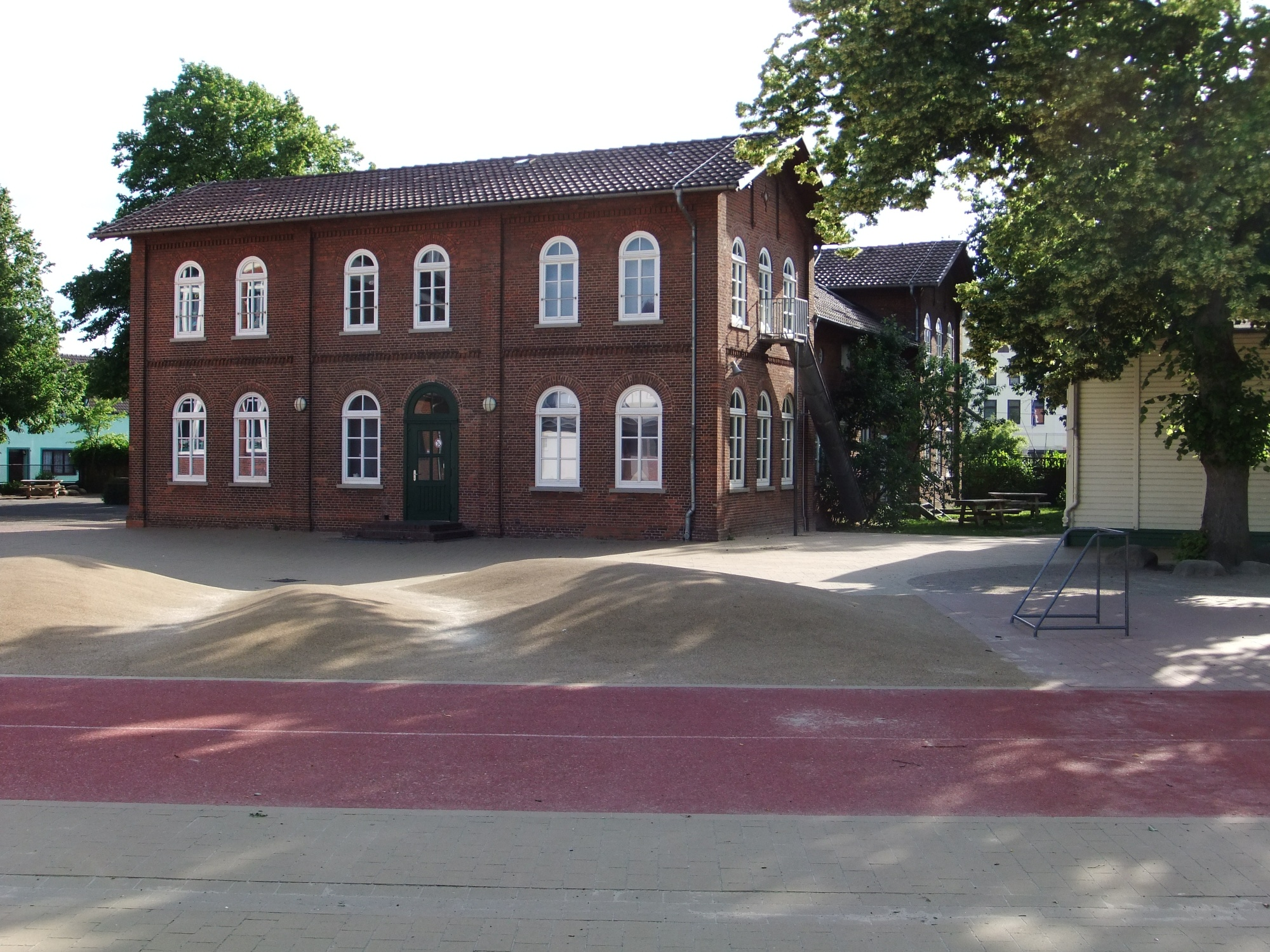 Wulsdorfer Schule in Bremerhaven, Sandbredenstraße 11.Das abgebildete Objekt ist ein geschütztes Kulturdenkmal in der Freien Hansestadt Bremen, mit der Nr. 3157 beim Landesamt für Denkmalpflege registriert.